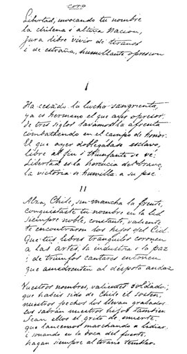 Texto autógrafo del Himno Nacional de Chile, con las modificaciones definitivas del año 1904, escrito de puño y mano por Eusebio Lillo, y depositado en esa época en los archivos del Ministerio de Educación, publicado en 1905 por Cannaro, documento hoy extraviado.